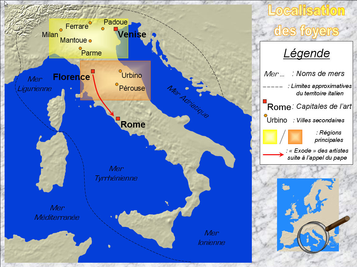 Auteur : Damien.L Cette carte représente les foyers de la Renaissance en Italie. Le support a été conçu avec le logiciel MapCreator, et le reste avec Microsoft Powerpoint. Elle est librement utilisable. Damien.L